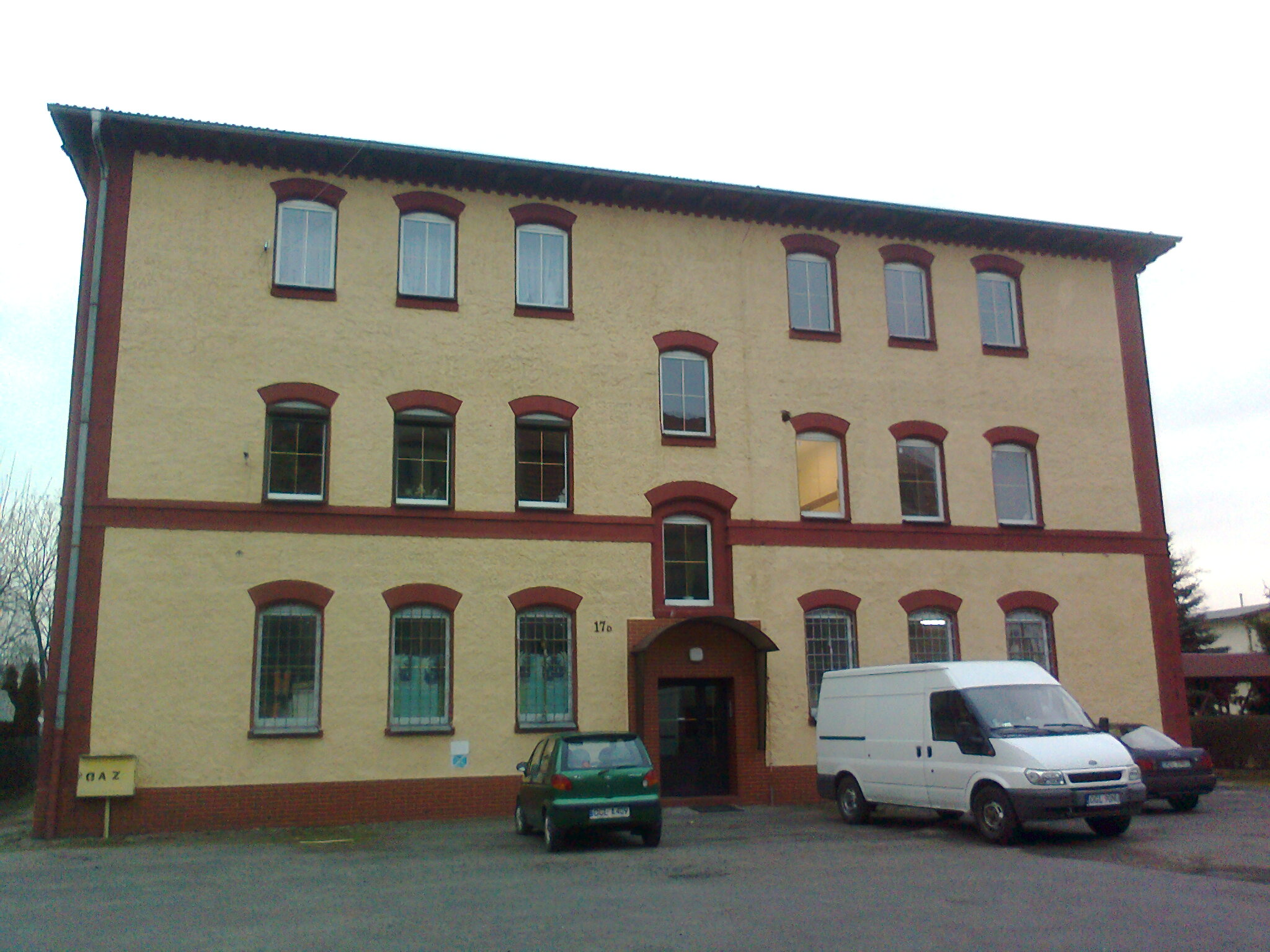 Głubczyce, byłe koszary w Głubczycach — widok od strony dawnego placu apelowego